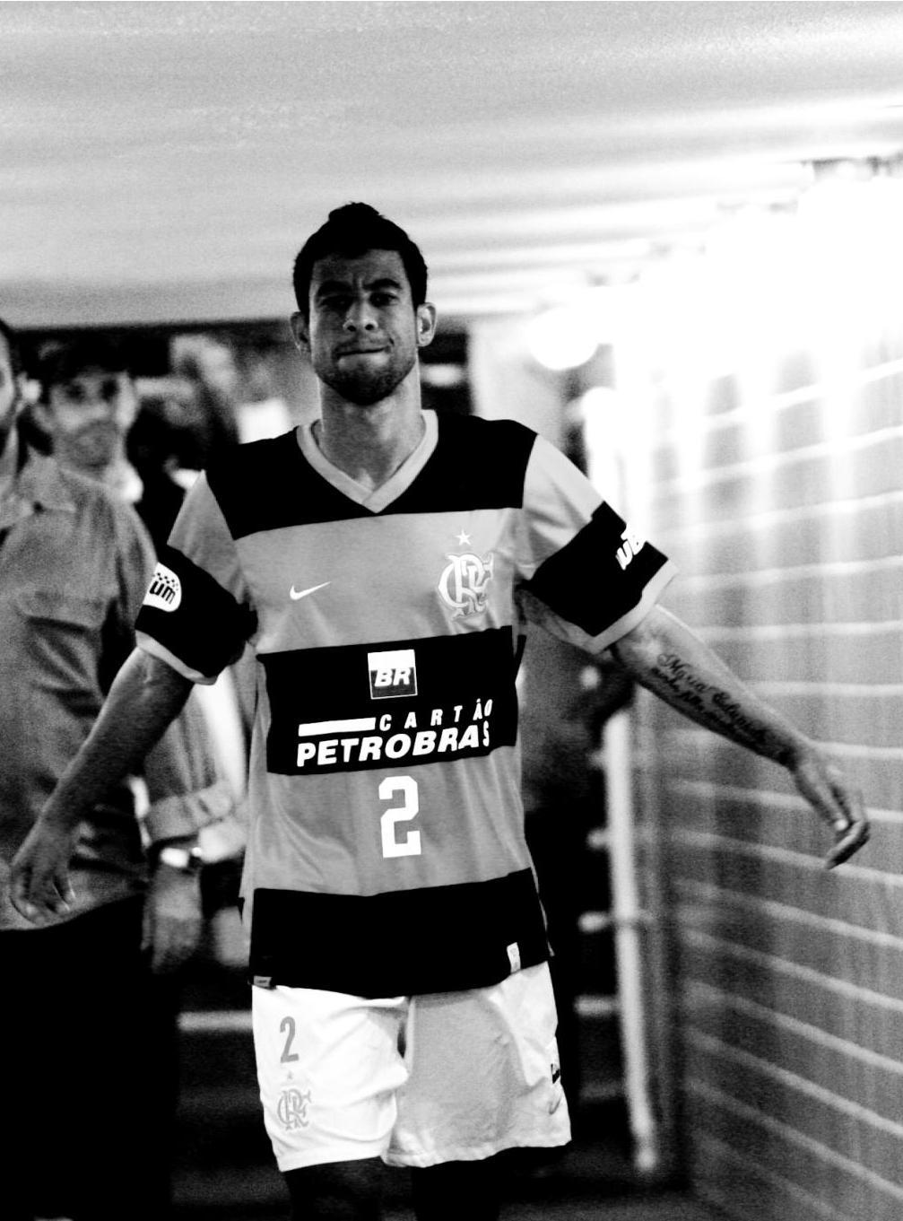 Leonardo Moura, lateral-direito do C.R. Flamengo.